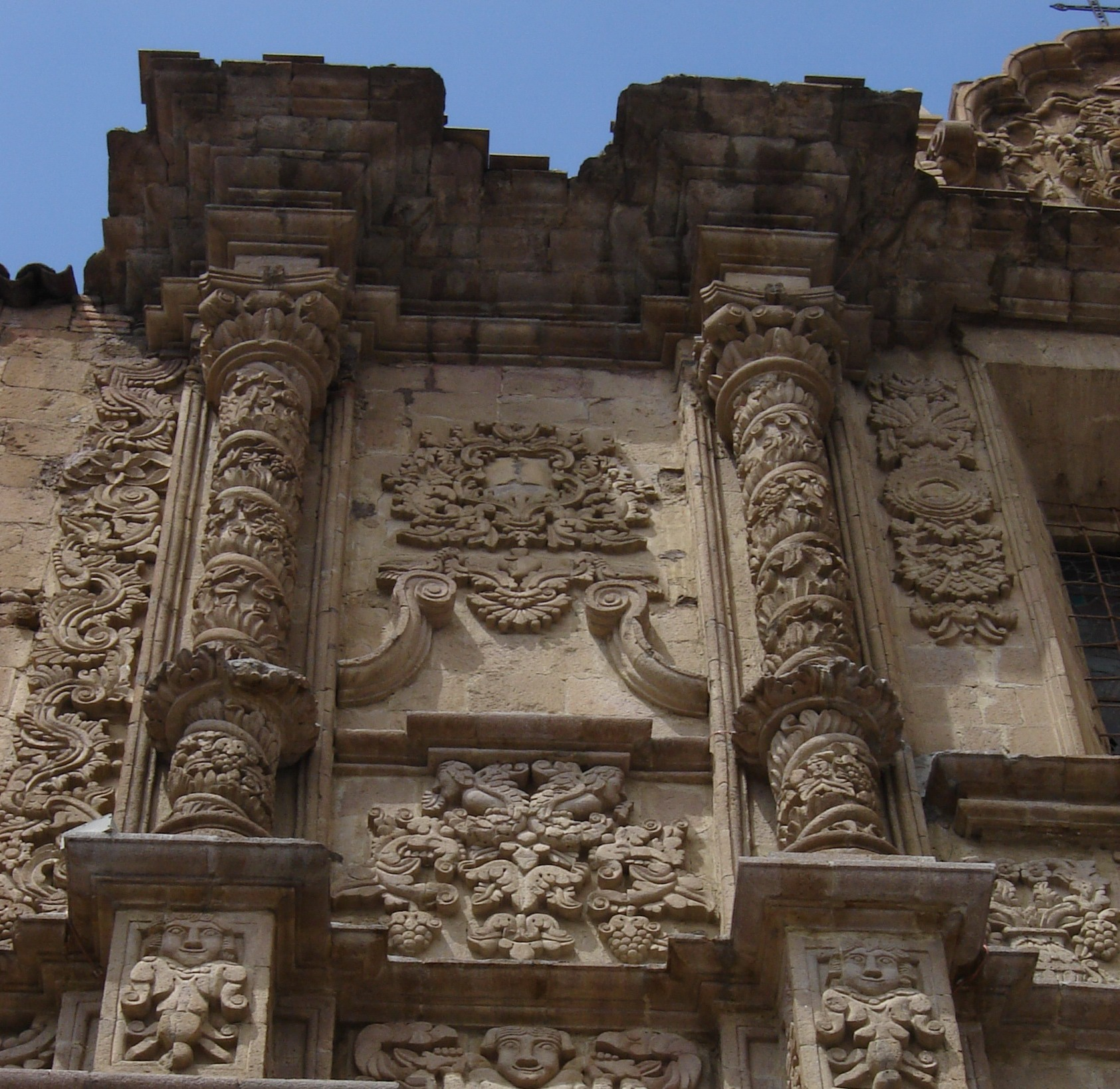 Detalle lateral con columnas salomónicas del templo de San Francisco en La Paz